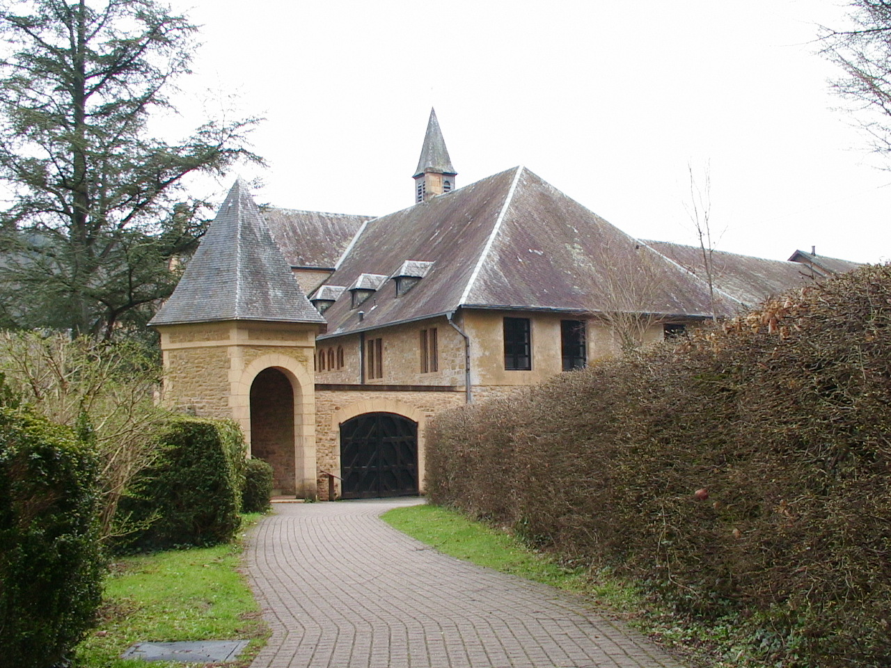 L'abbaye d'Orval (Belgique) : bâtiment de l'accueil vu de l'intérieur de l'abbaye.